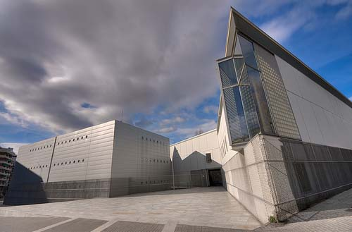 Archibo d'a Corona d'Aragón